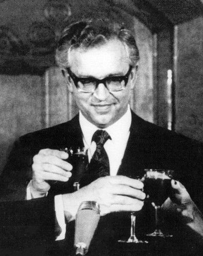 1971 Copenhagen Alexei Kosygin, Helle Virkner Krag, Egon Weidekamp Press Photo